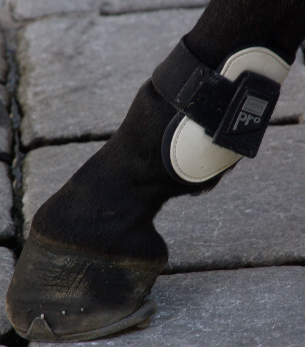 Protections du cheval - protège boulet